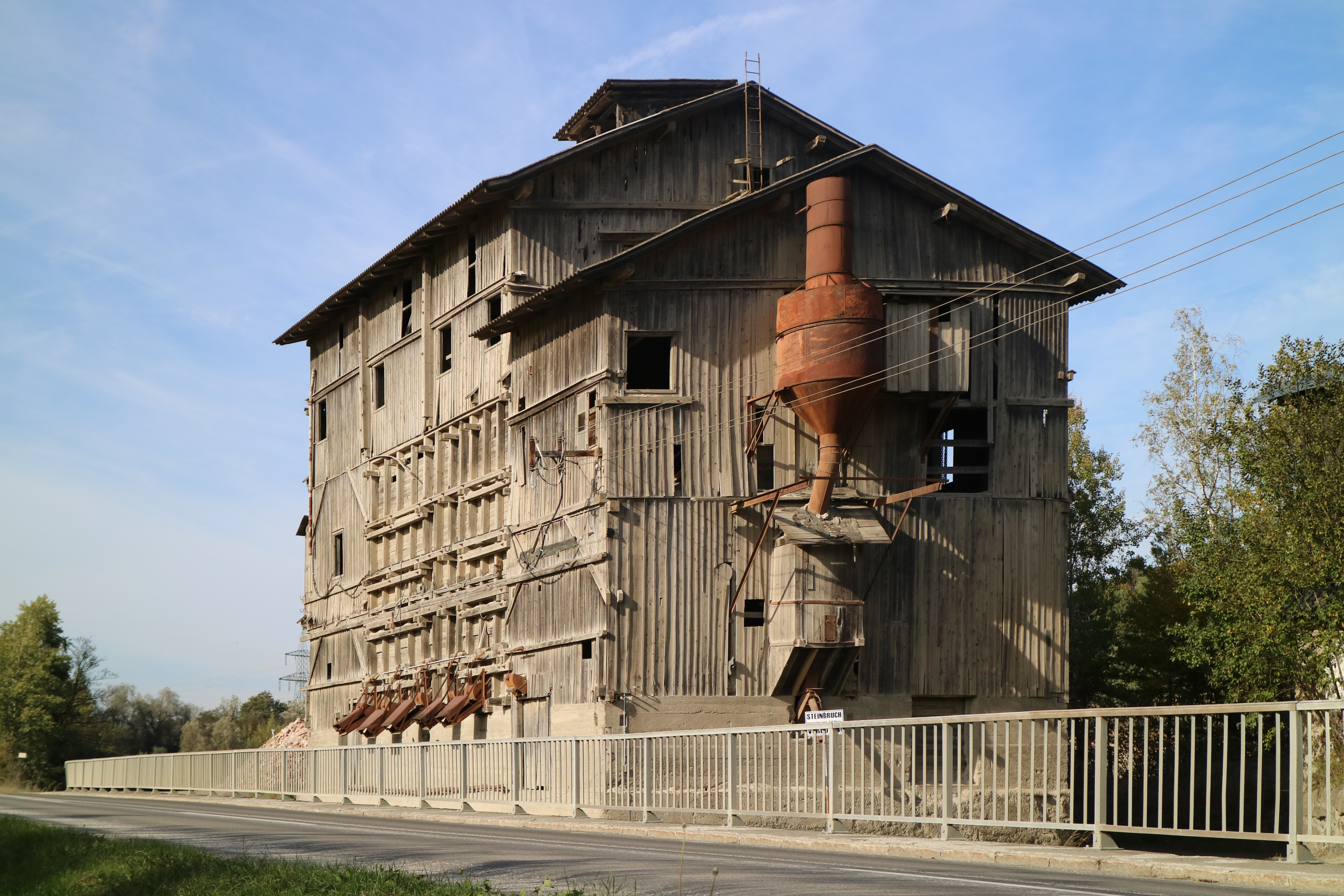 Ehemalige Steinbrechanlage des Basaltsteinbruchs Weitendorf, Ansicht von Süden